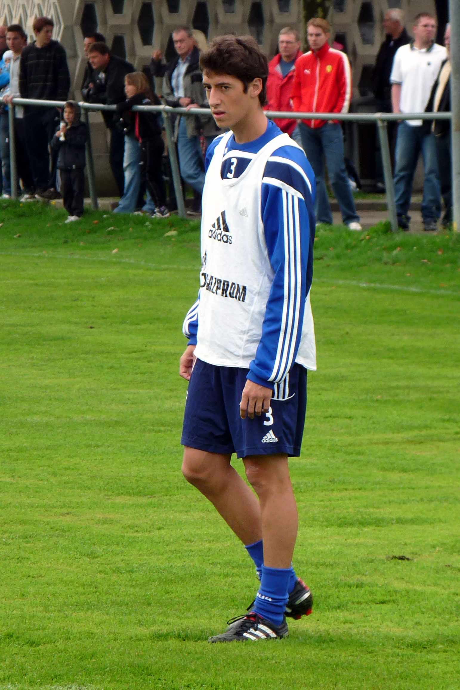 Sergio Escudero während einer Trainingseinheit